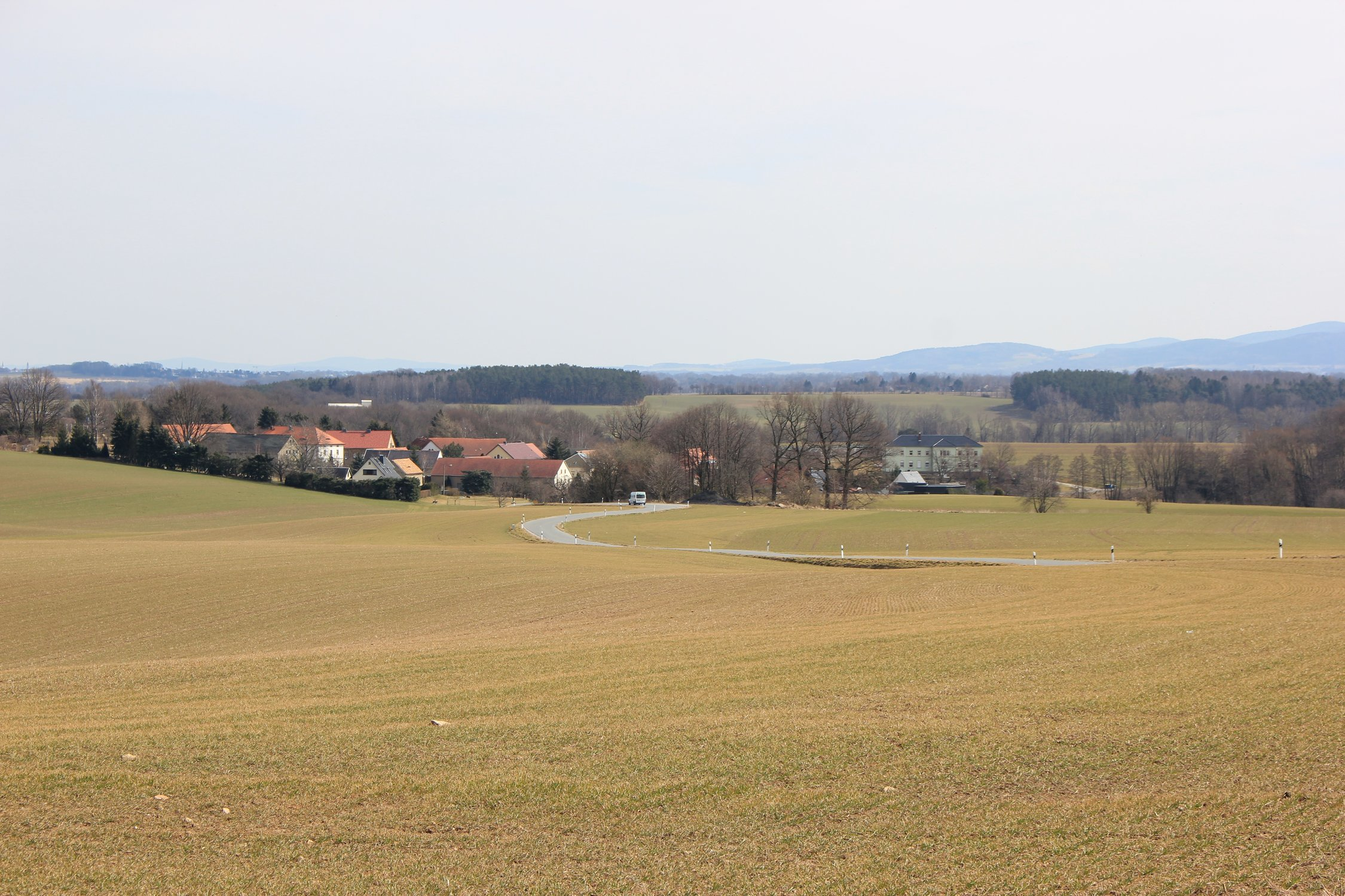 Hornjoserbsce: Napohlad Chanec ze zapada.